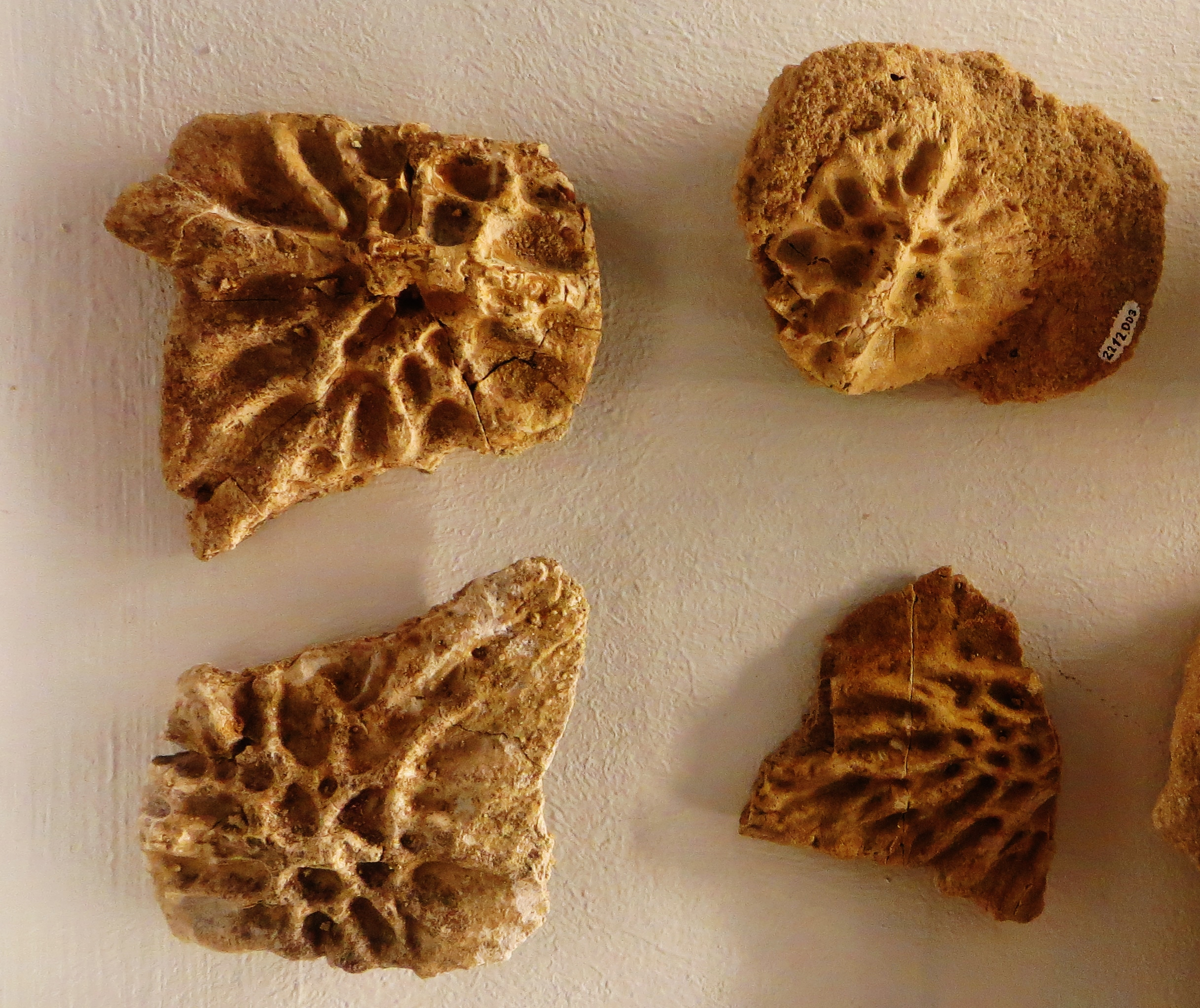 Fossil of Belodon, an extinct reptile - Took the picture at Museum of Paleontology, Tuebingen